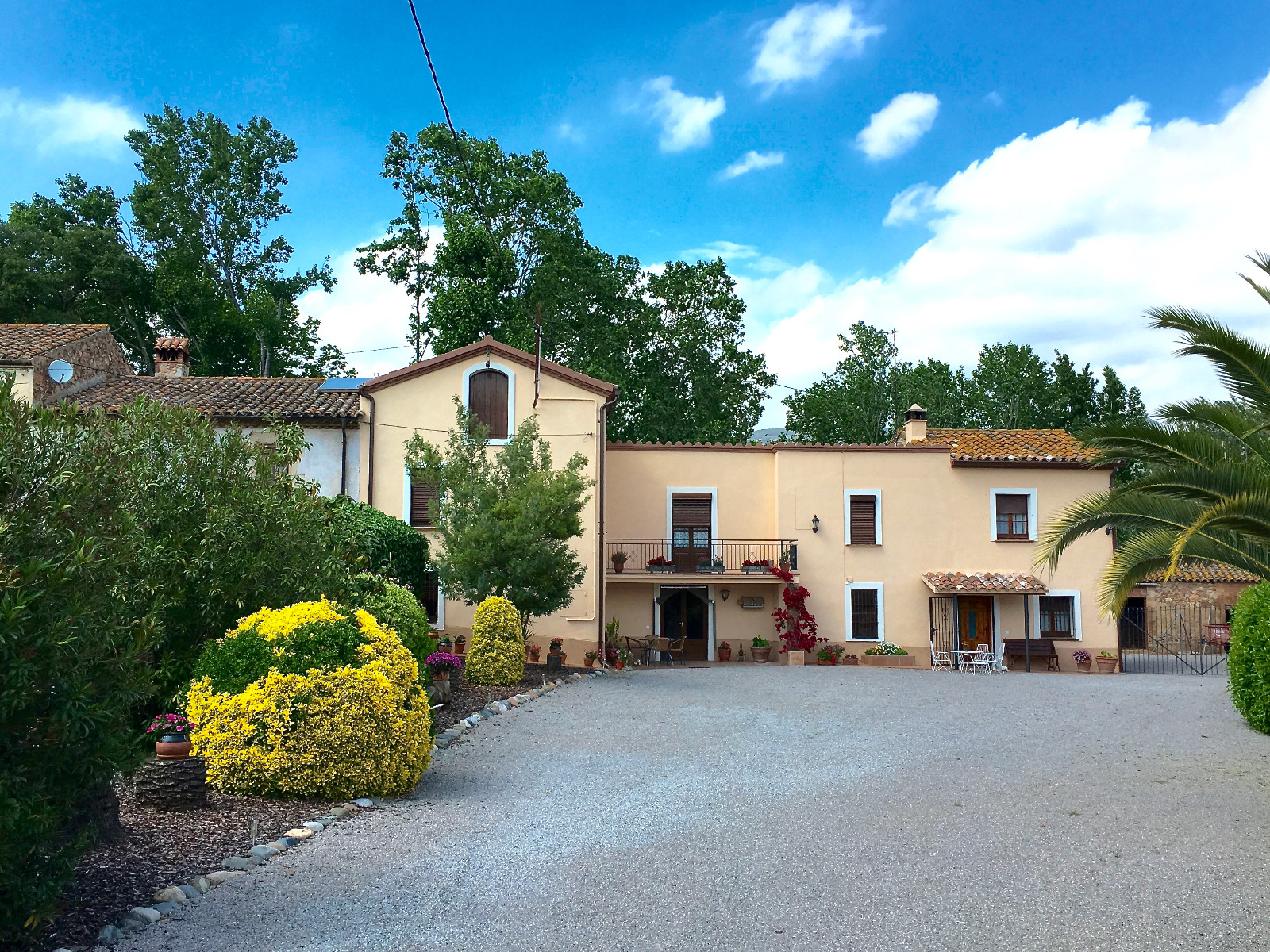 Can Tasar